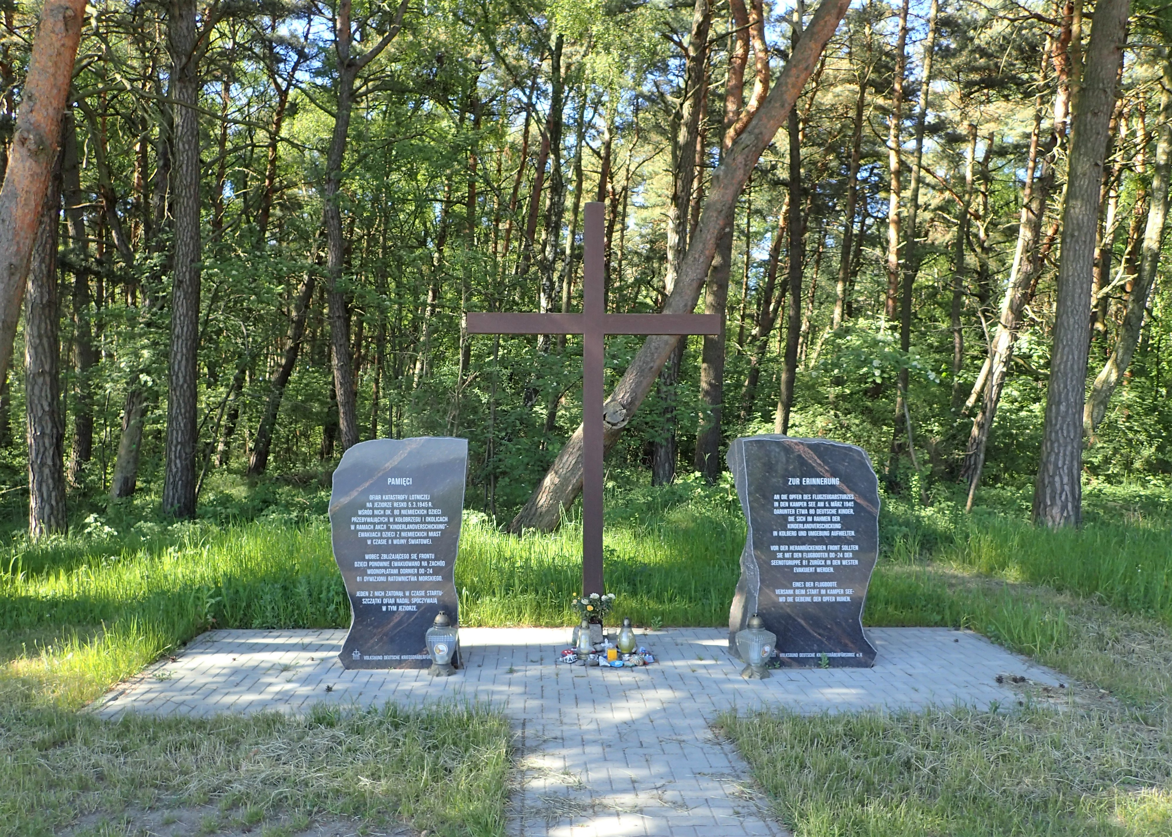 Pomnik upamiętniający 80 dzieci niemieckich, które zatonęły w czasie ewakuacji wodnopłatem 5 marca 1945 w jeziorze Resko Przymorskie